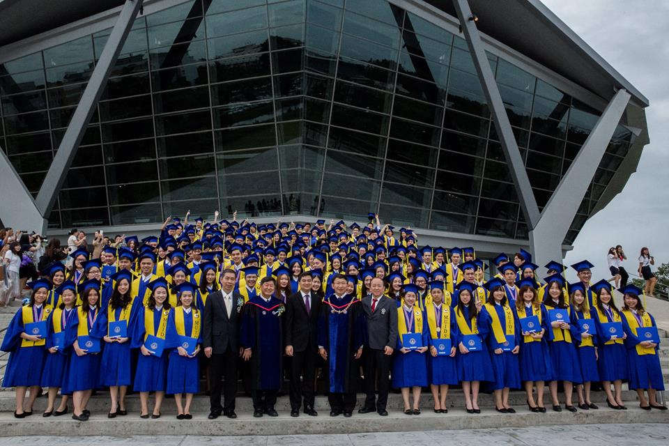 นักเรียนโรงเรียนสาธิตนานาชาติ มหาวิทยาลัยมหิดล มัธยมศึกษาปีที่ 6 (เกรด 12) รุ่นที่ 1